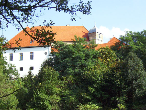 Schloss Fronberg in Schwandorf (OT Fronberg)